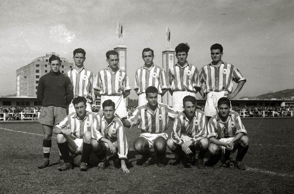 Partido de la Real Sociedad en Atotxa